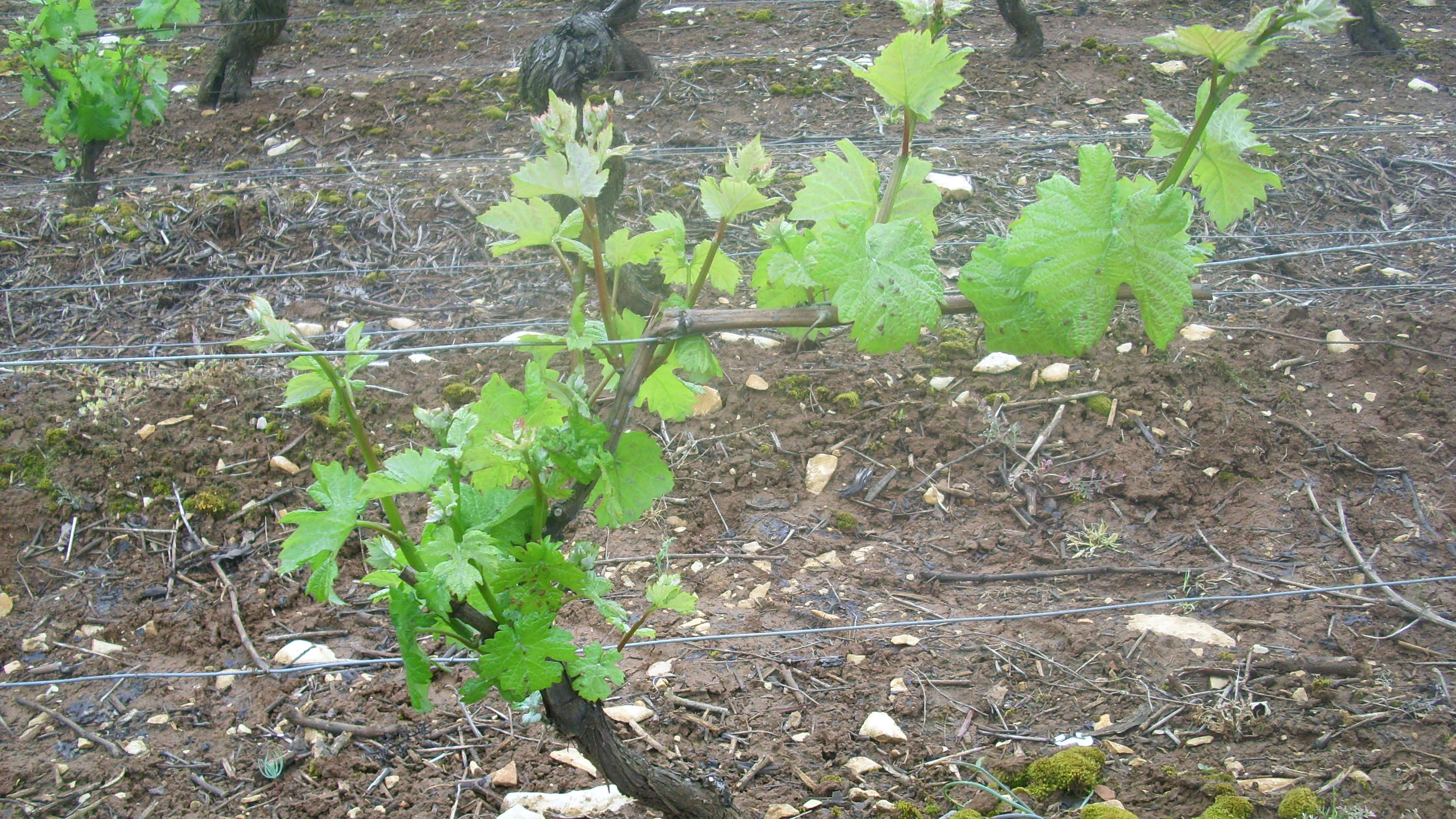 Pied de vigne avant ebourgeonnage